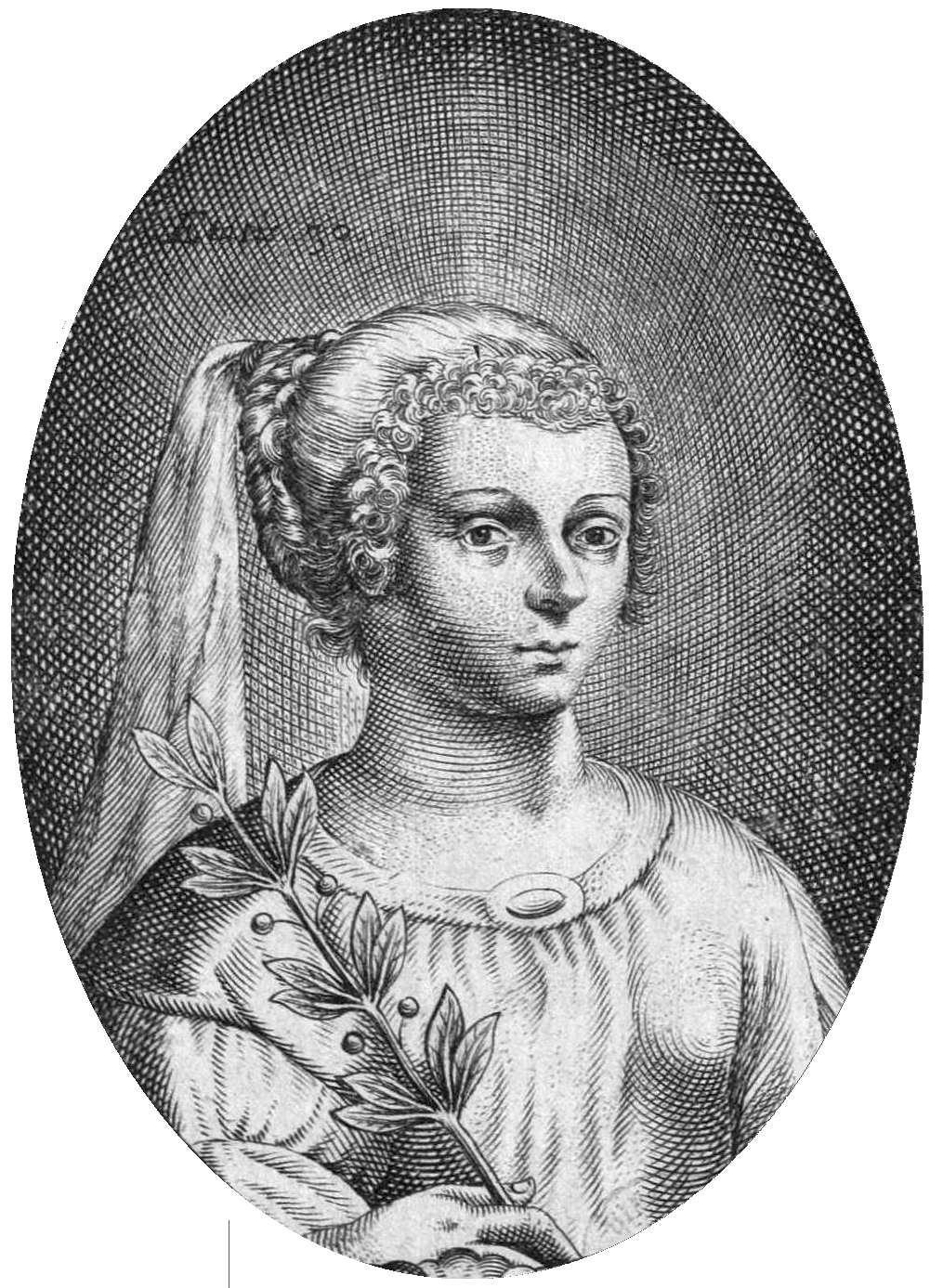 Portrait de Marie de Gournay - reproduction du portrait mis par elle en tête de l'édition des "Advis ou Presens" de 1641 ... reproduit dans l'edition de 1910 de La fille d'alliance de Montaigne de Mario Schiff